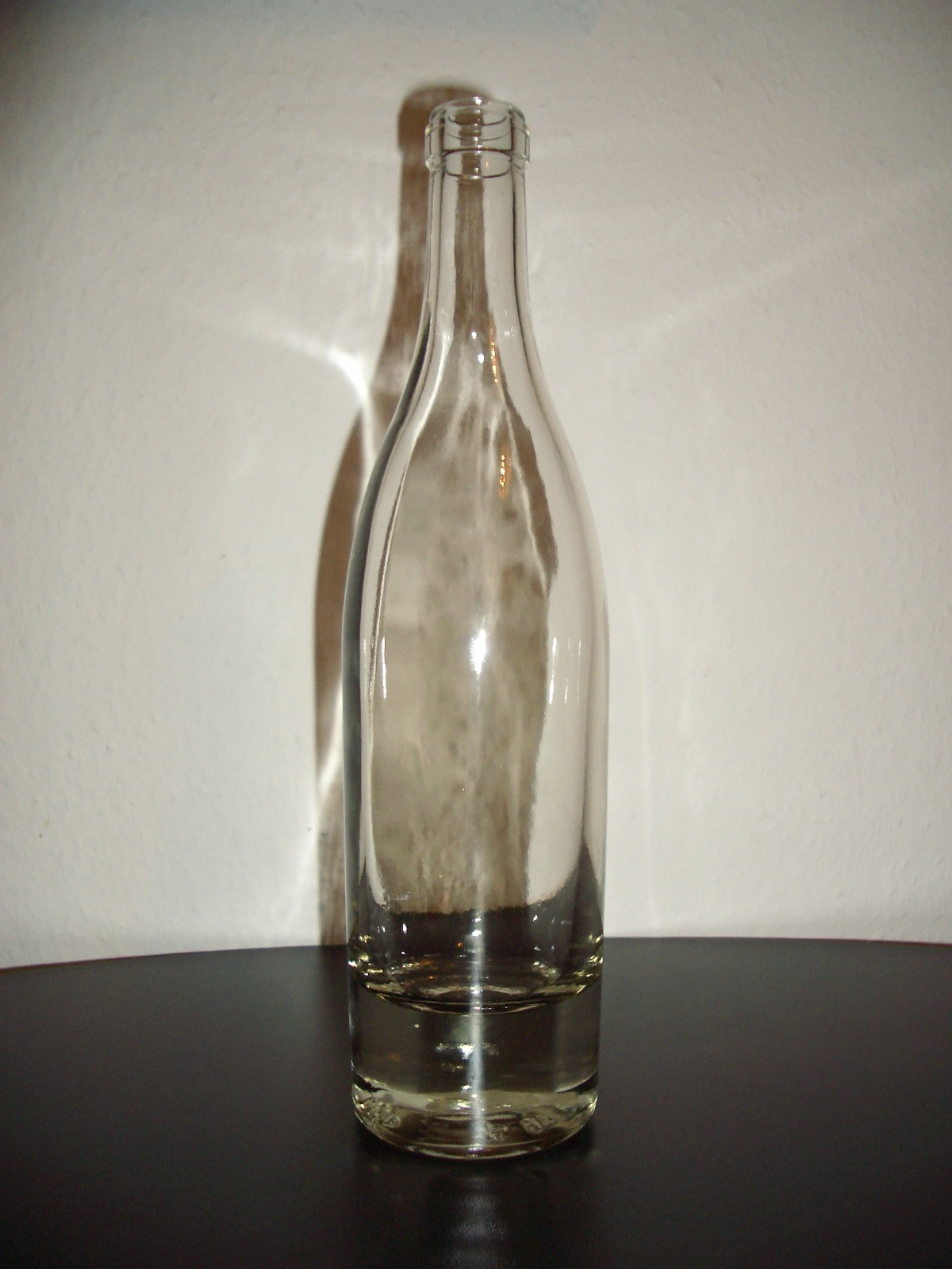 Pot Lyonnais